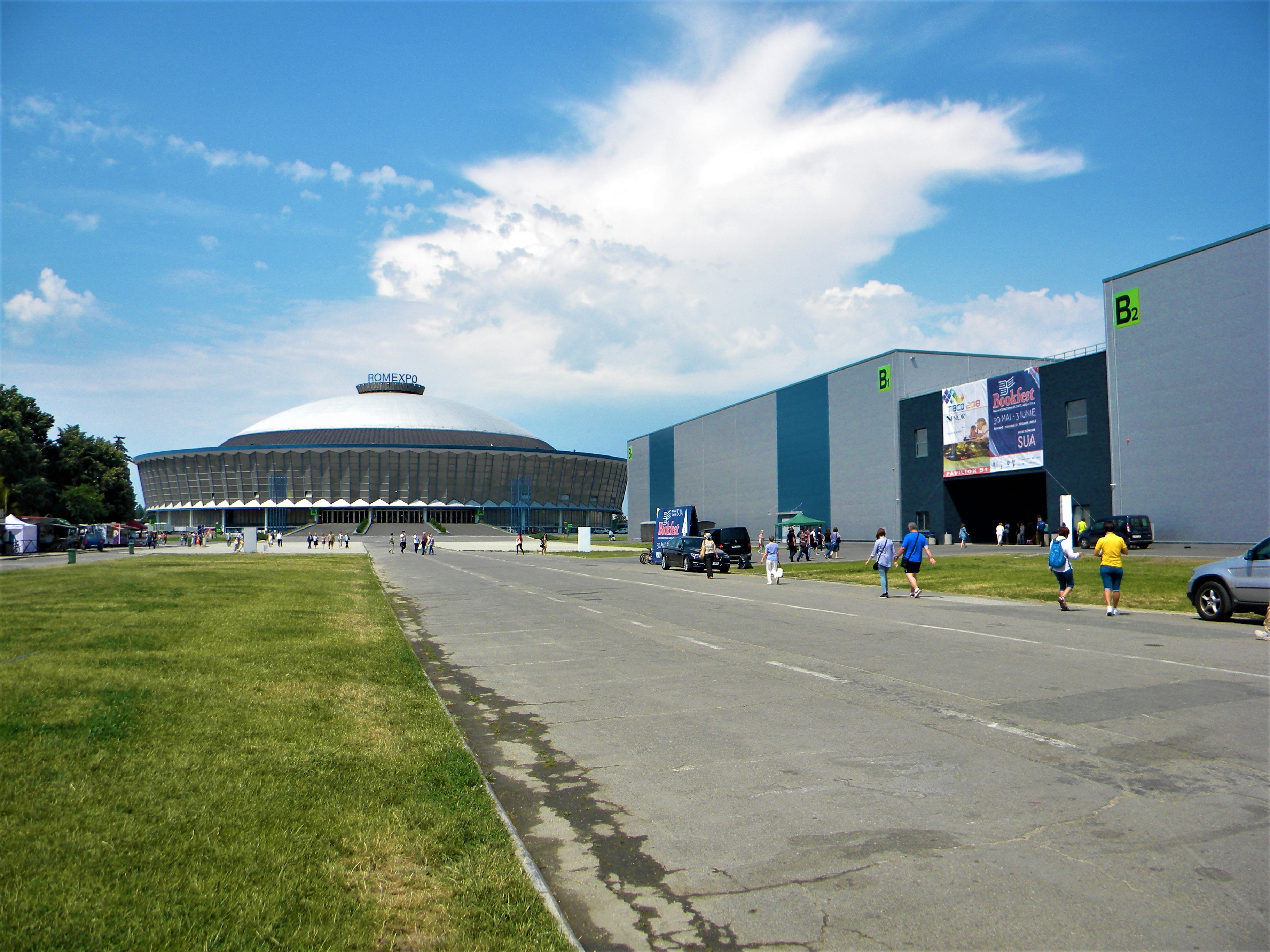 Bucuresti, Romania. ROMEXPO. 2 Iunie 2018. BOOKFEST-Salonul International de Carte